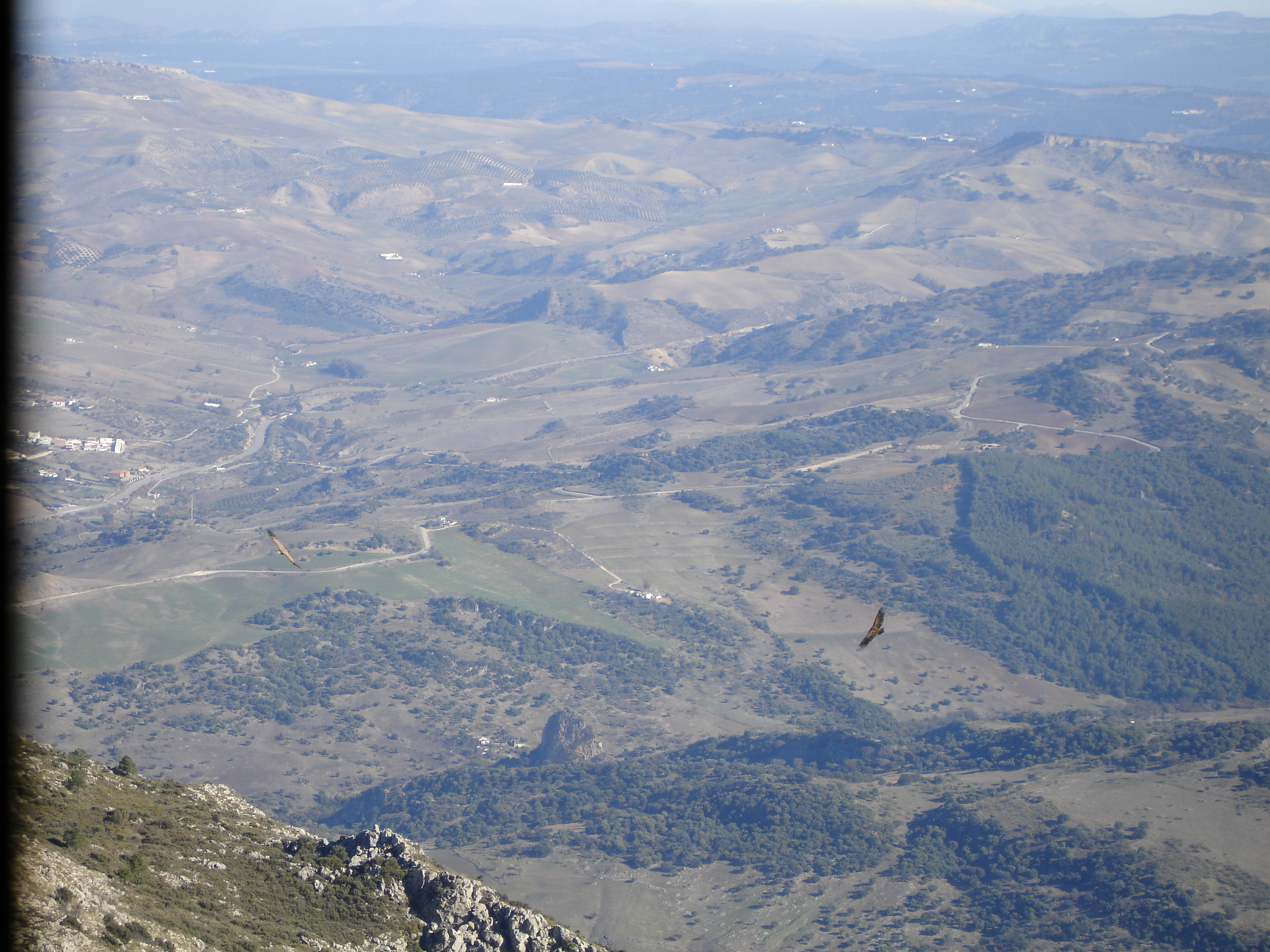 Buiters junto a sus Buitreras en el Cerro Coros